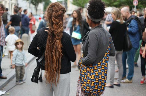 Dreimühlenstraße München